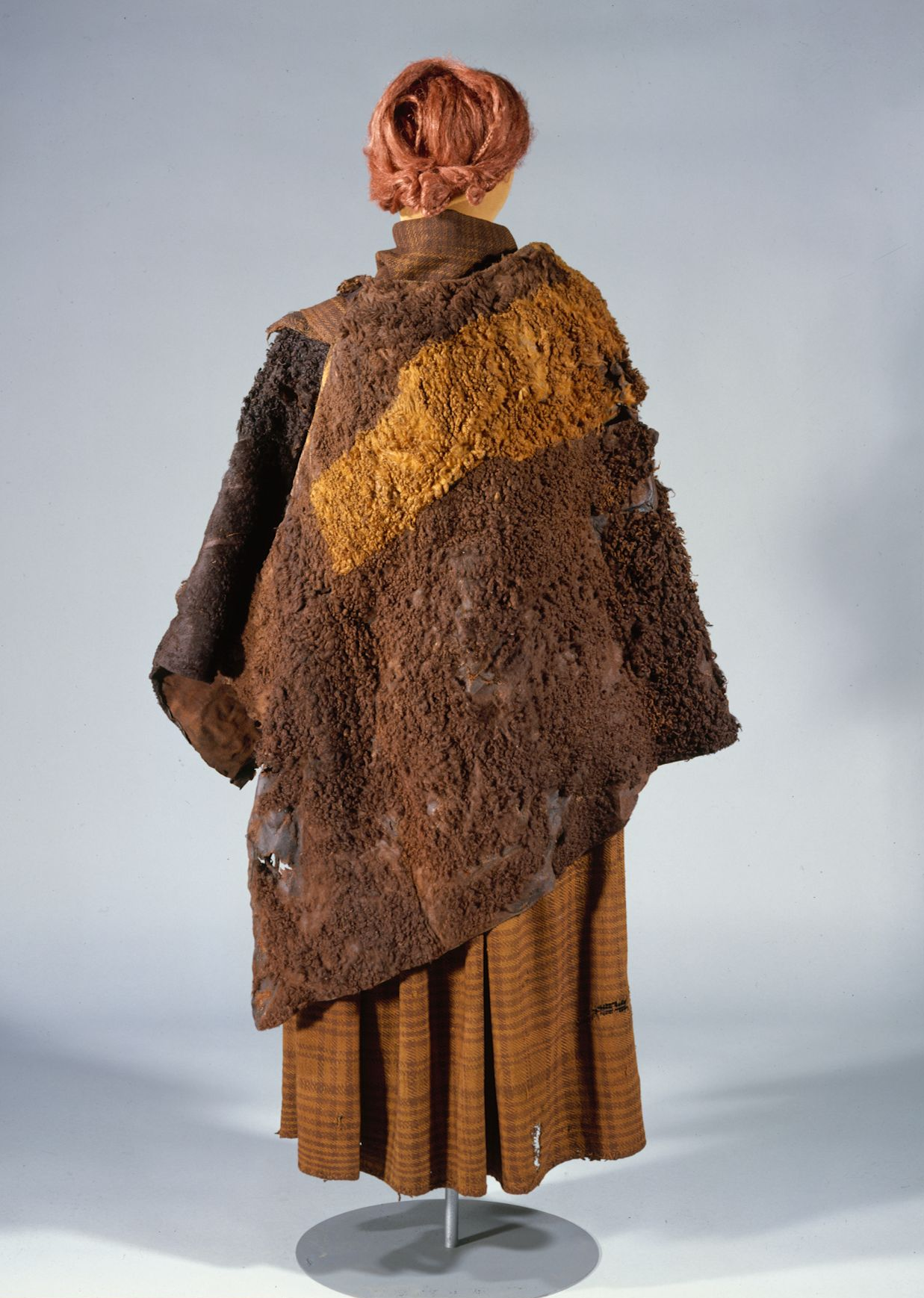 Kvindedragt fra Huldremosekvinden bestående af 2 skindslag + halsklæde og skørt af uld. Fra Huldremose, Ørum sogn. Fra nyopstilling, 1980